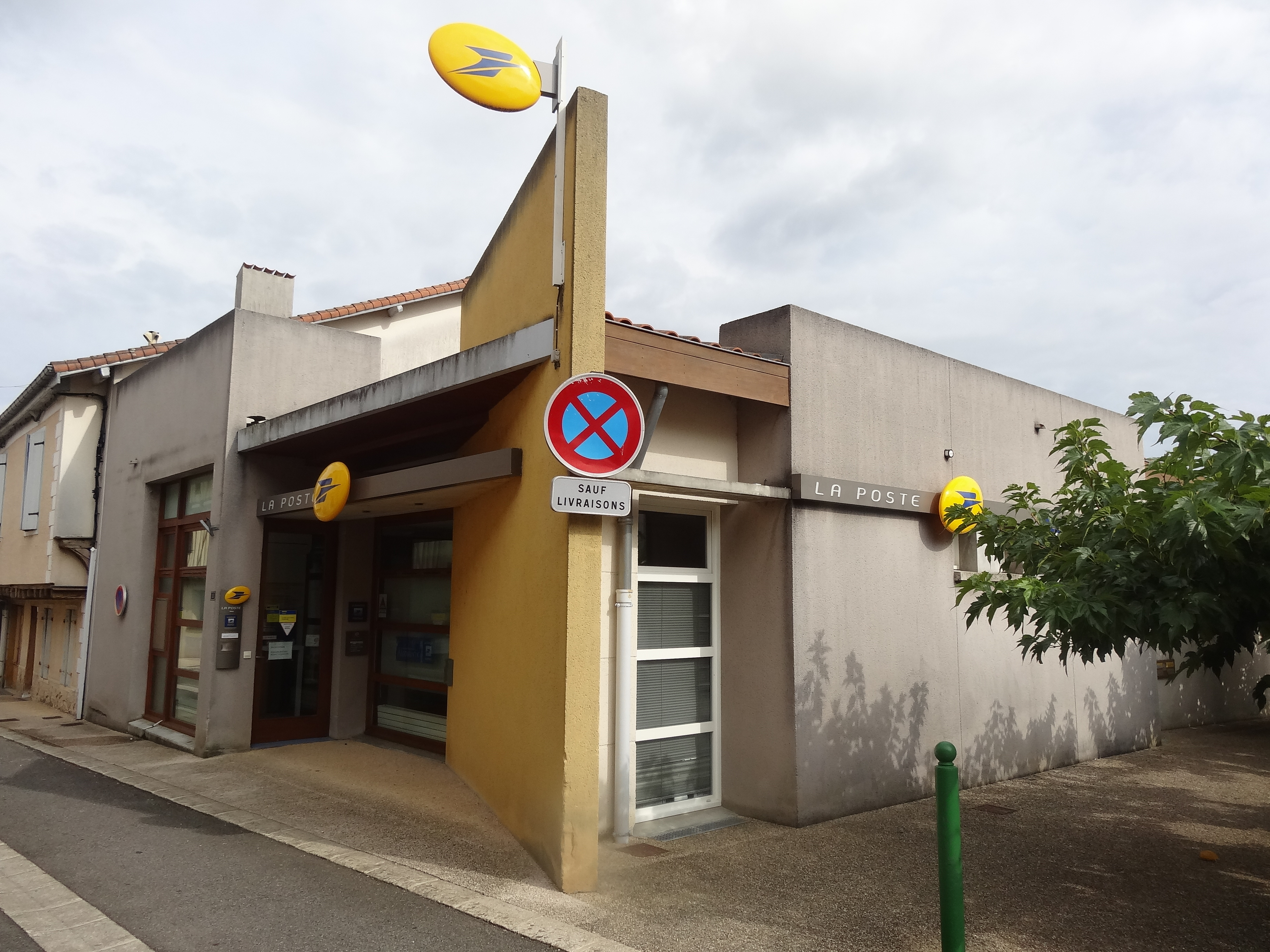 Agence postale de Miélan.